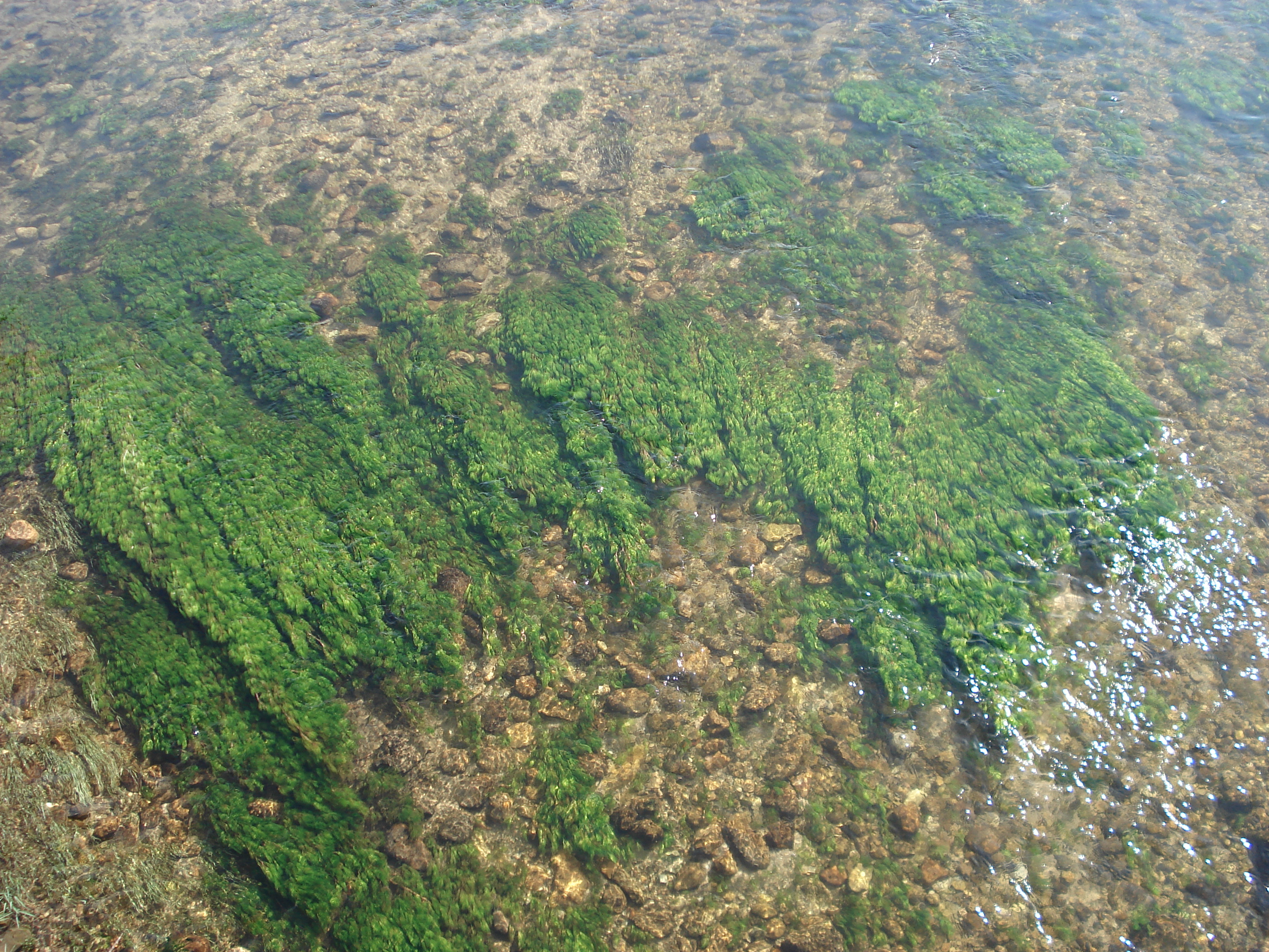 Algas en el fondo del río Lozoya a su paso por Alameda del Valle (Madrid, España)